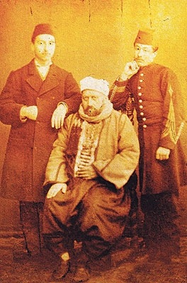 Sultan-Abdulaziz